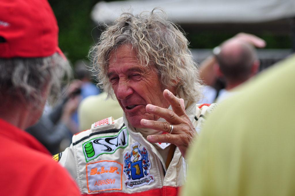 Arturo Merzario in Goodwood 2009